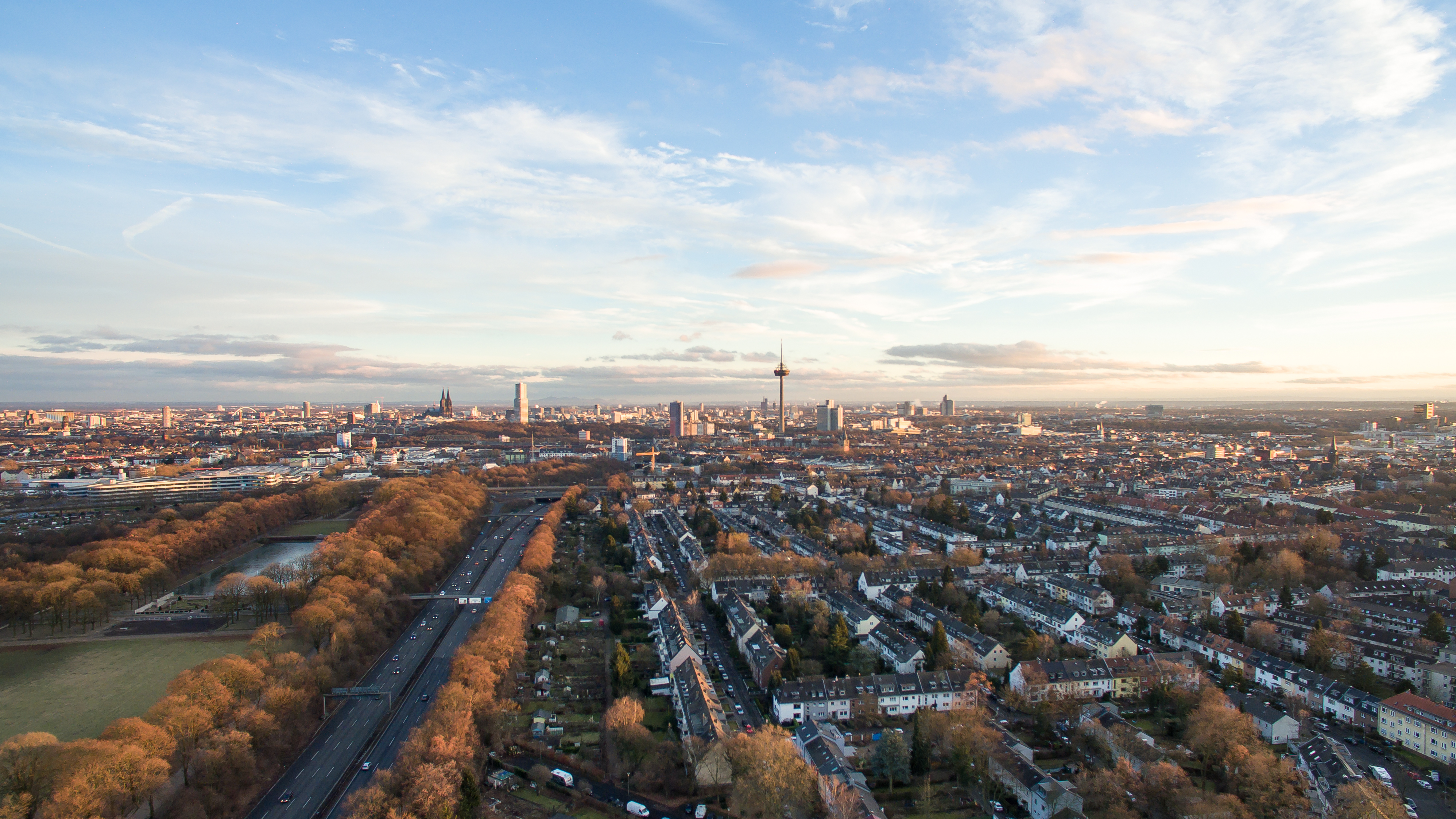 Blick über Köln-Neuehrenfeld in südöstlicher Richtung